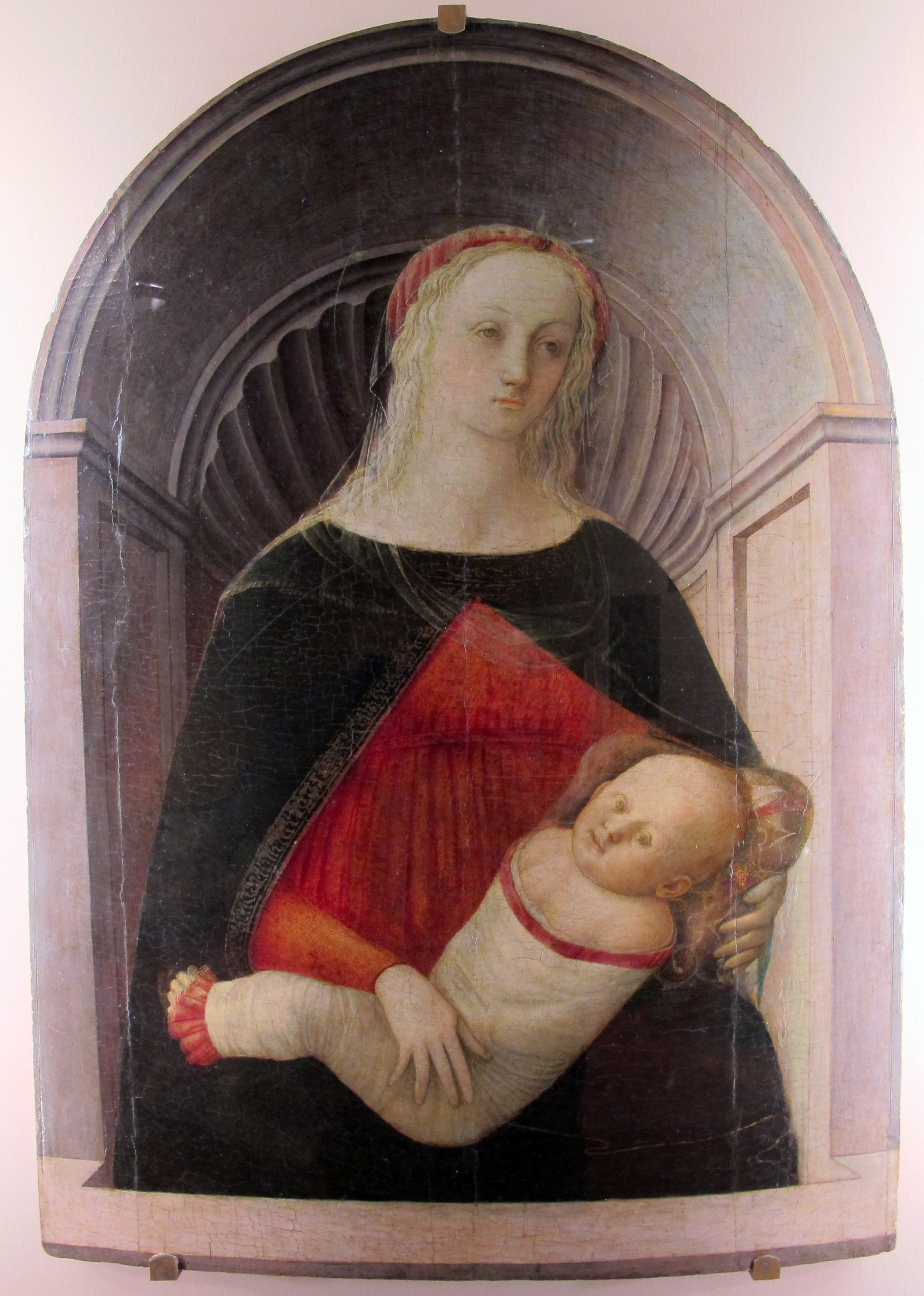 Museo di arte sacra (Montespertoli)